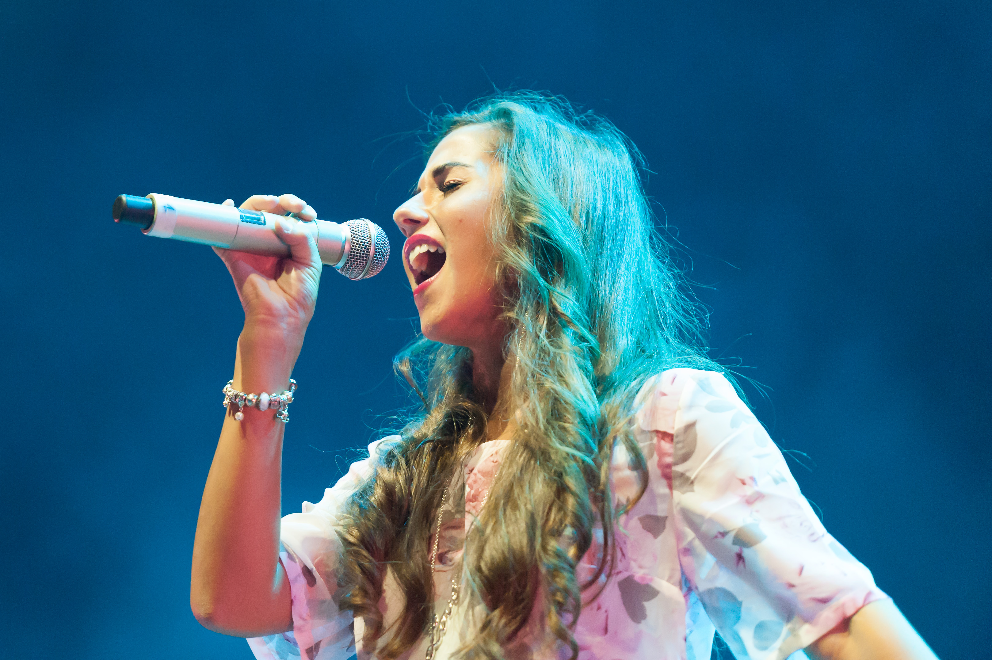 DSDS Live on Tour mit Sarah Lombardi am 27. Juli 2014 in der Stadthalle Wien.